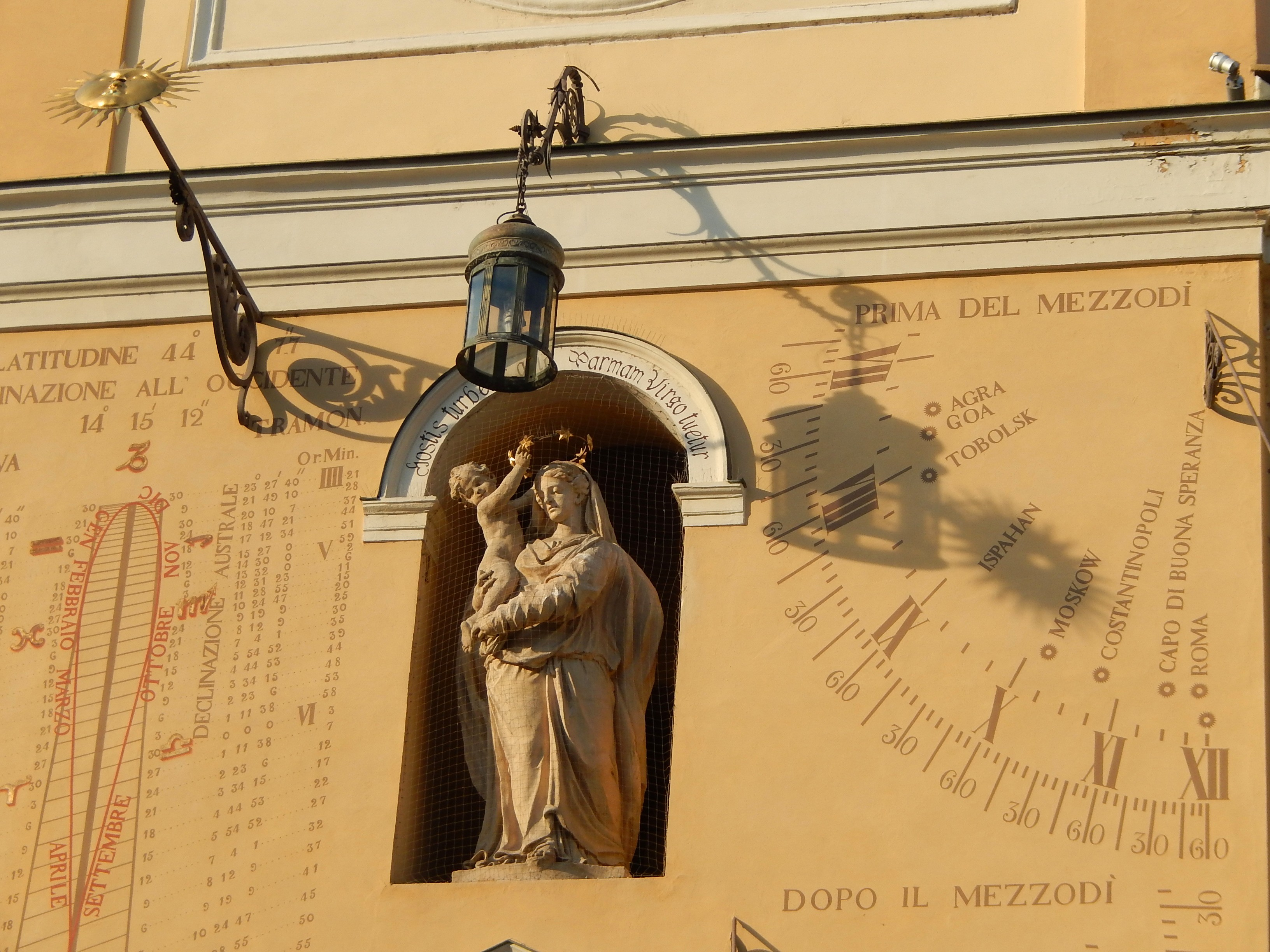 Palazzo del Governatore, Parma: meridiane This is a photo of a monument which is part of cultural heritage of Italy.